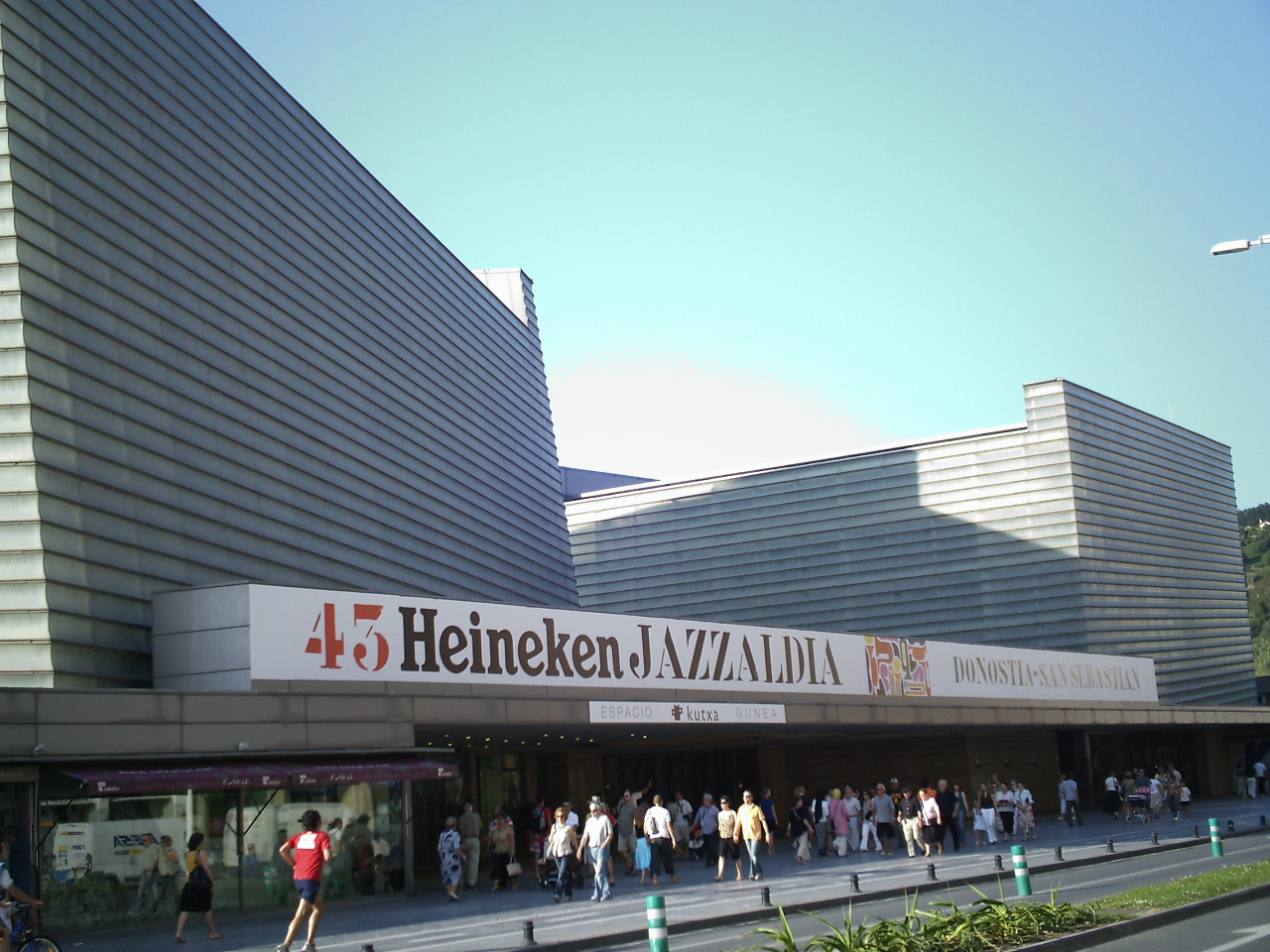 Jazzaldia. Festival Internacional de Jazz de Donostia - País Vasco (Spain)